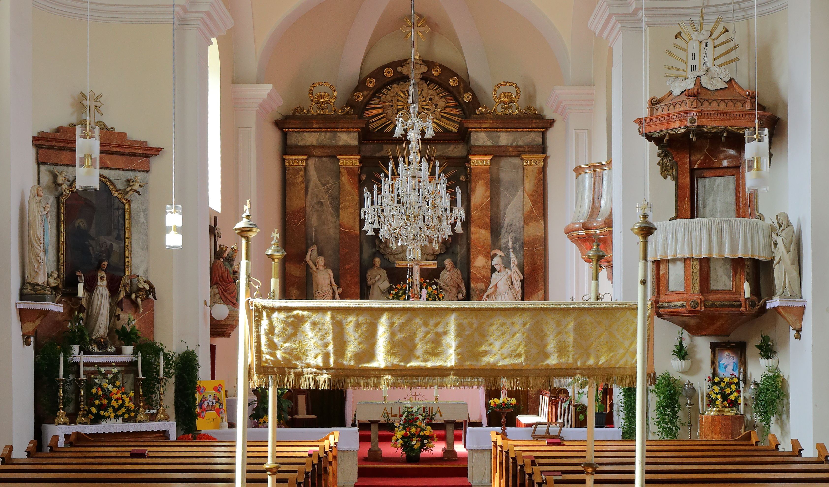 Innenansicht der römisch-katholischen Pfarrkirche Mariae Namen in Wetzelsdorf, ein Ortsteil der niederösterreichischen Stadt Poysdorf.Ein klassizistischer Hochaltar mit einem Mariahilf-Altarbild aus dem Anfang des 19. Jahrhunderts. Die Holzkanzel stammt aus dem Ende des 19. Jahrhunderts.